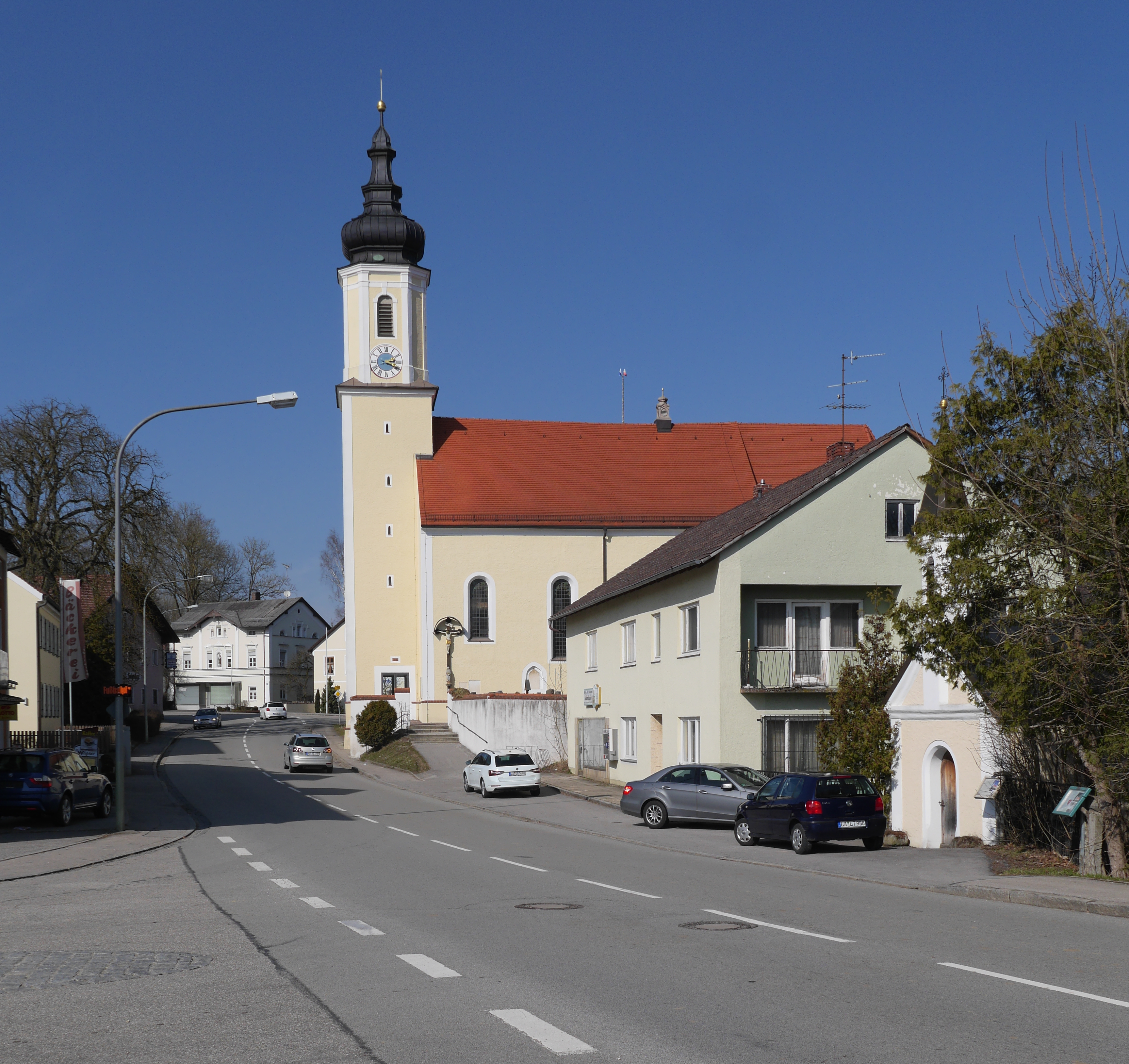 Katholische Pfarrkirche Mariä Himmelfahrt in Egglkofen, von der Landshuter Straße aus Richtung Süden gesehen, rechts die Wieskapelle This is a photograph of an architectural monument.